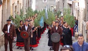 Pinochada. Fiesta popular de la población de Vinuesa